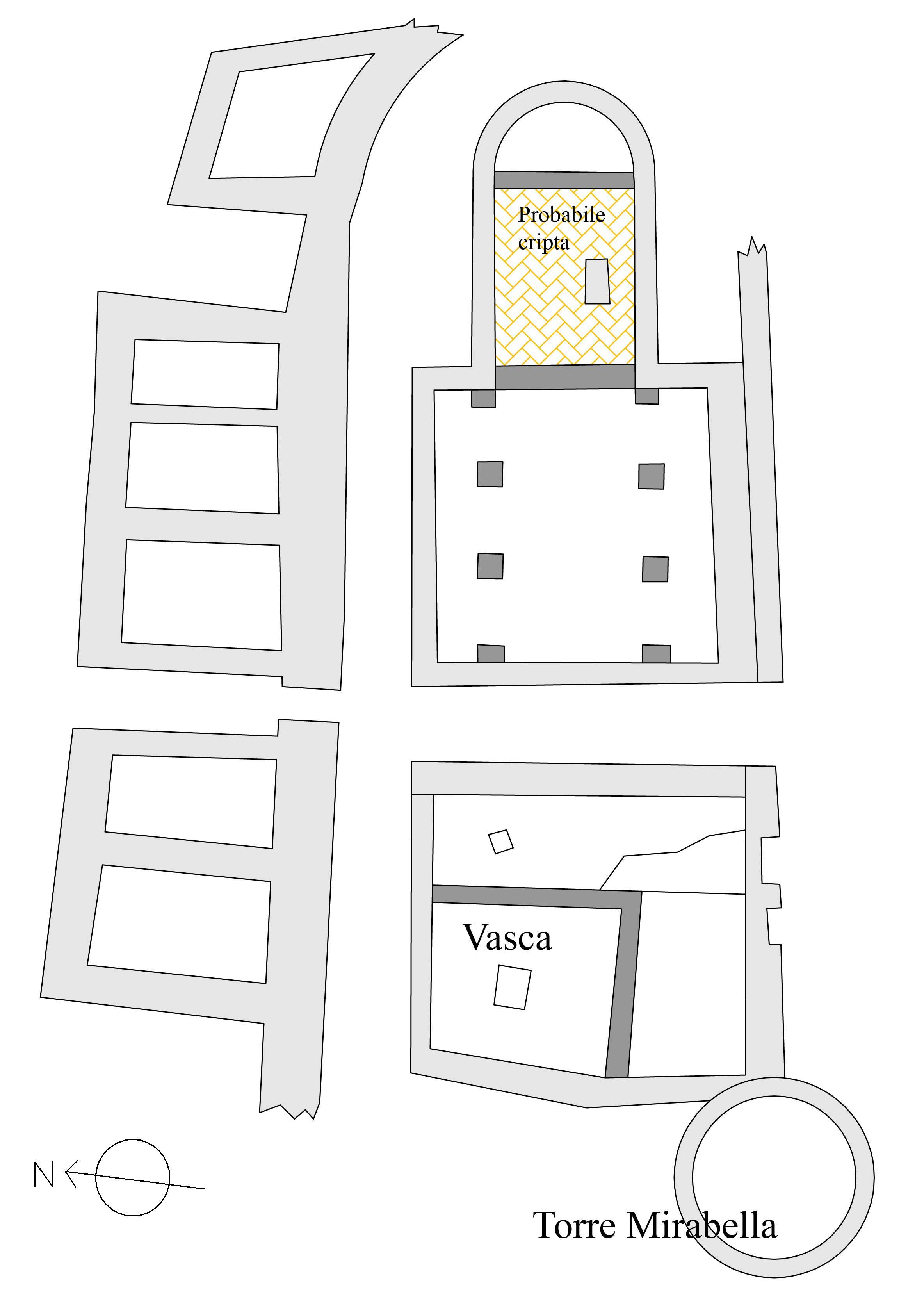 santo stefano in arce pianta.jpg